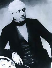 French engineer Paul-Camille von Denis (1796-1872)